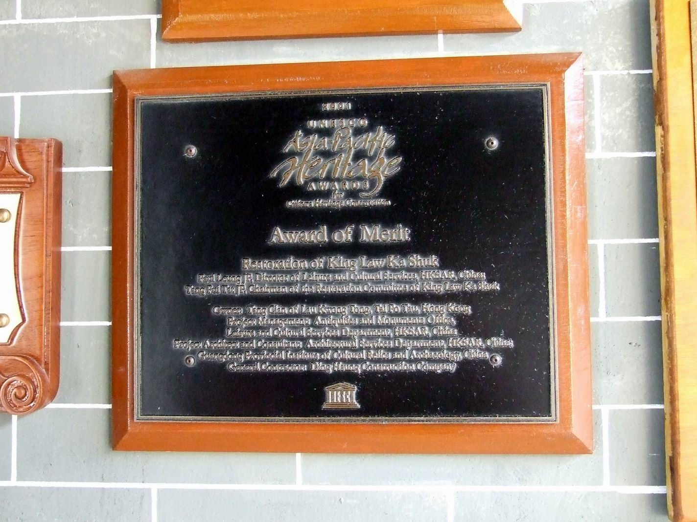 敬羅家塾古蹟保護獎傑出項目獎